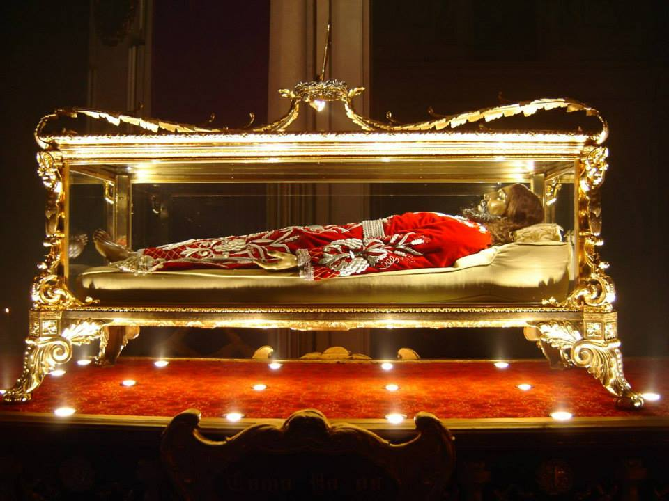 Guatemala